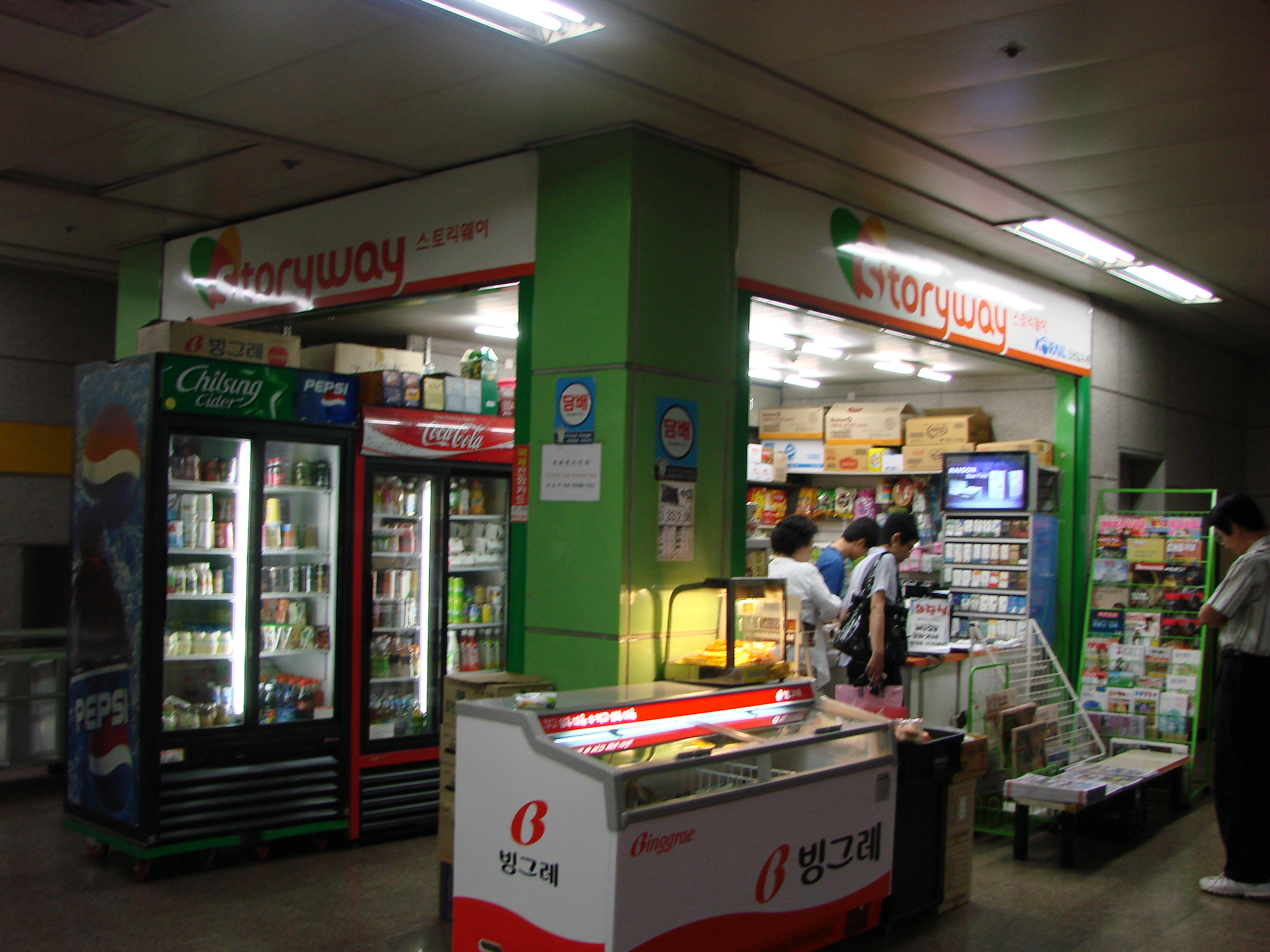 수도권 전철 분당선 선릉역 내에 입점한 스토리웨이 편의점